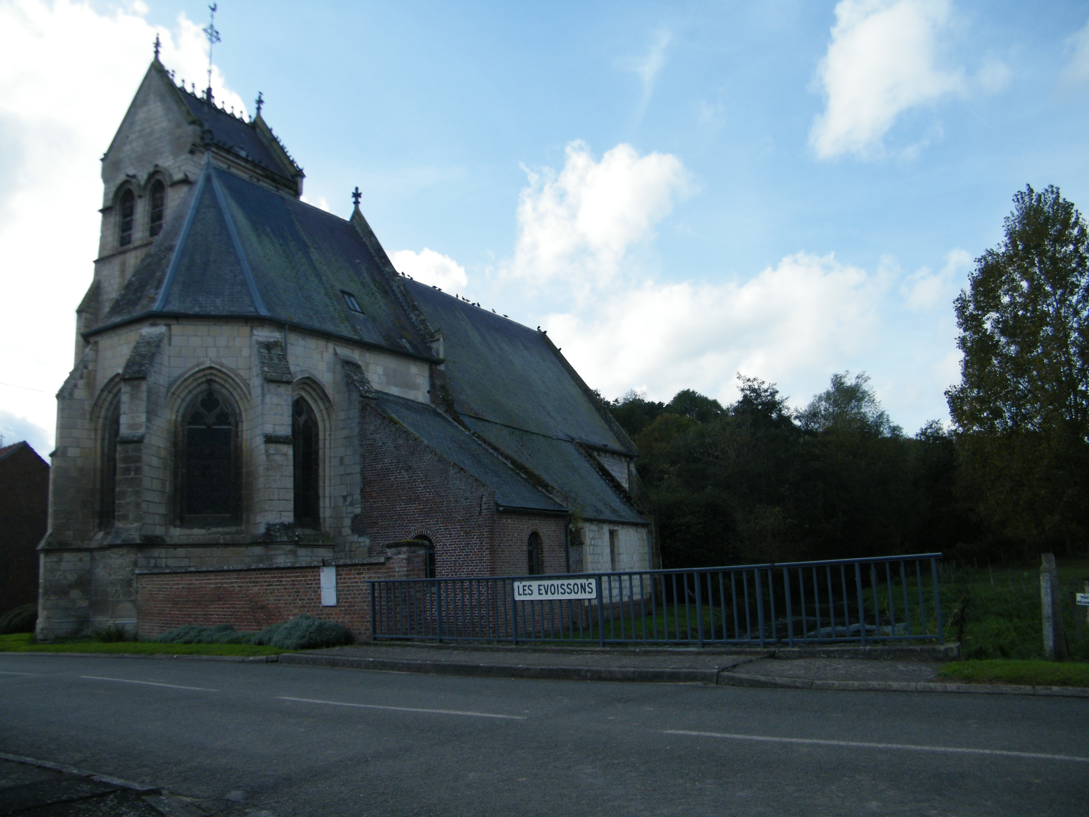 église.